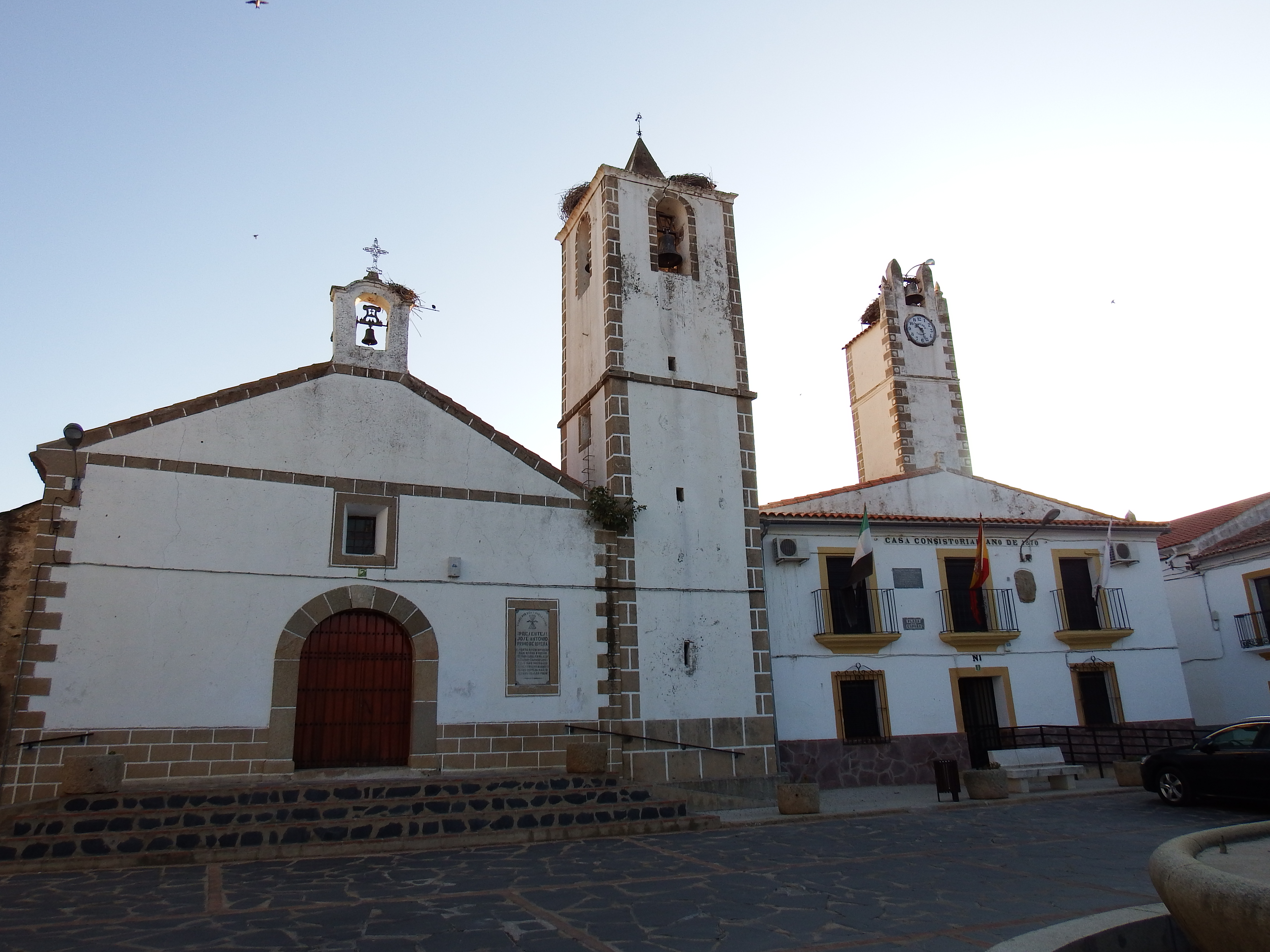 Herreruela